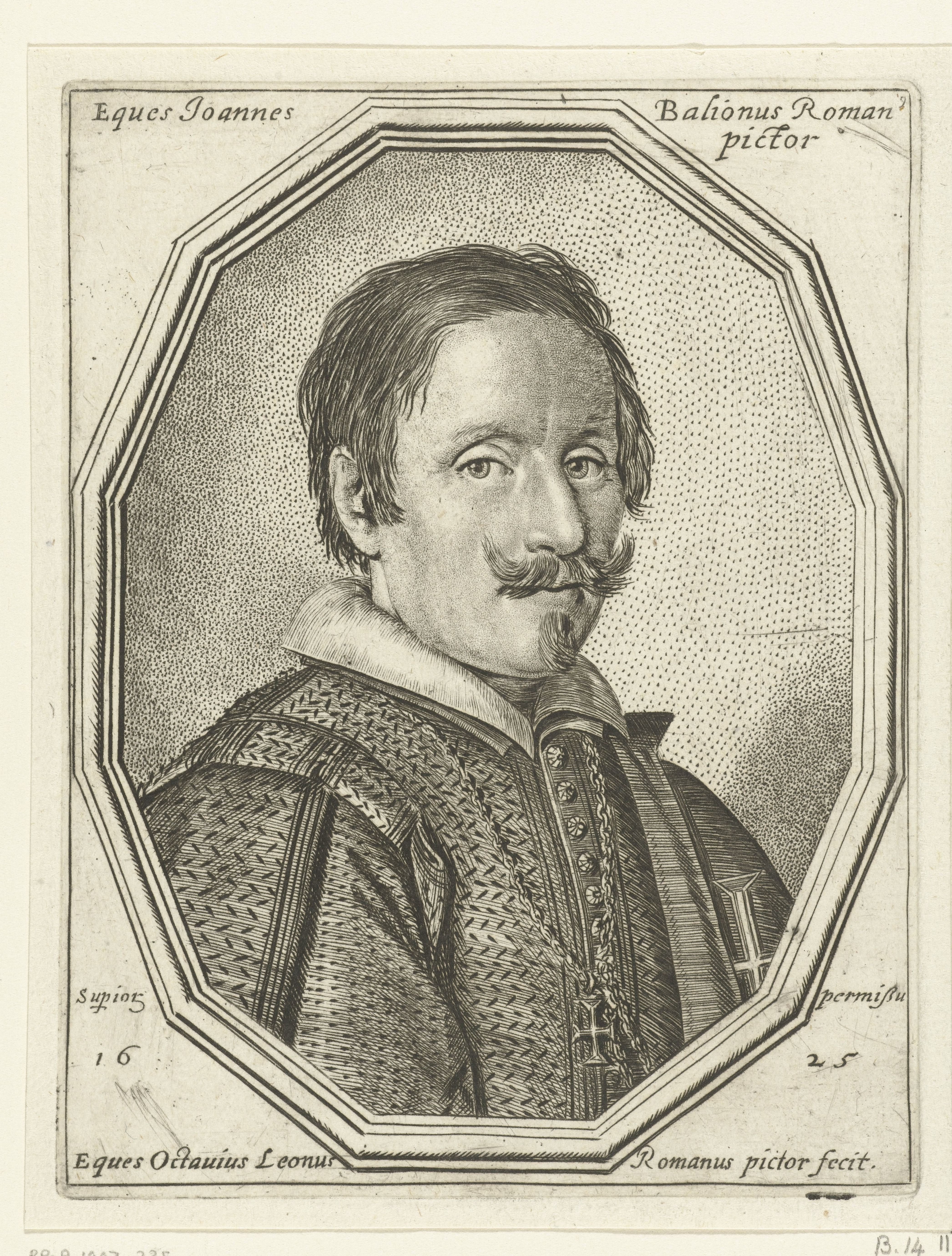 IdentificatieTitel(s): Portret van Giovanni BaglioniEques Joannes Balionus Romanus pictor (titel op object)Objecttype: prent Objectnummer: RP-P-1907-235Catalogusreferentie: The Illustrated Bartsch 14Opschriften / Merken: verzamelaarsmerk, verso midden, gestempeld: Lugt 2228Omschrijving: Portret van de schilder Giovanni Baglioni in een twaalfhoekige omlijsting. Aan zijn ketting draagt hij een kruis van de Orde van Christus.VervaardigingVervaardiger: prentmaker: Ottavio Mario Leoninaar eigen ontwerp van: Ottavio Mario LeoniPlaats vervaardiging: ItaliëDatering: 1625Fysieke kenmerken: ets en stippeletsMateriaal: papier Techniek: etsenAfmetingen: plaatrand: h 144 mm × b 112 mmOnderwerpWat: portrait, self-portrait of artistWie: Giovanni BaglioneVerwerving en rechtenVerwerving: aankoop 1905Copyright: Publiek domein